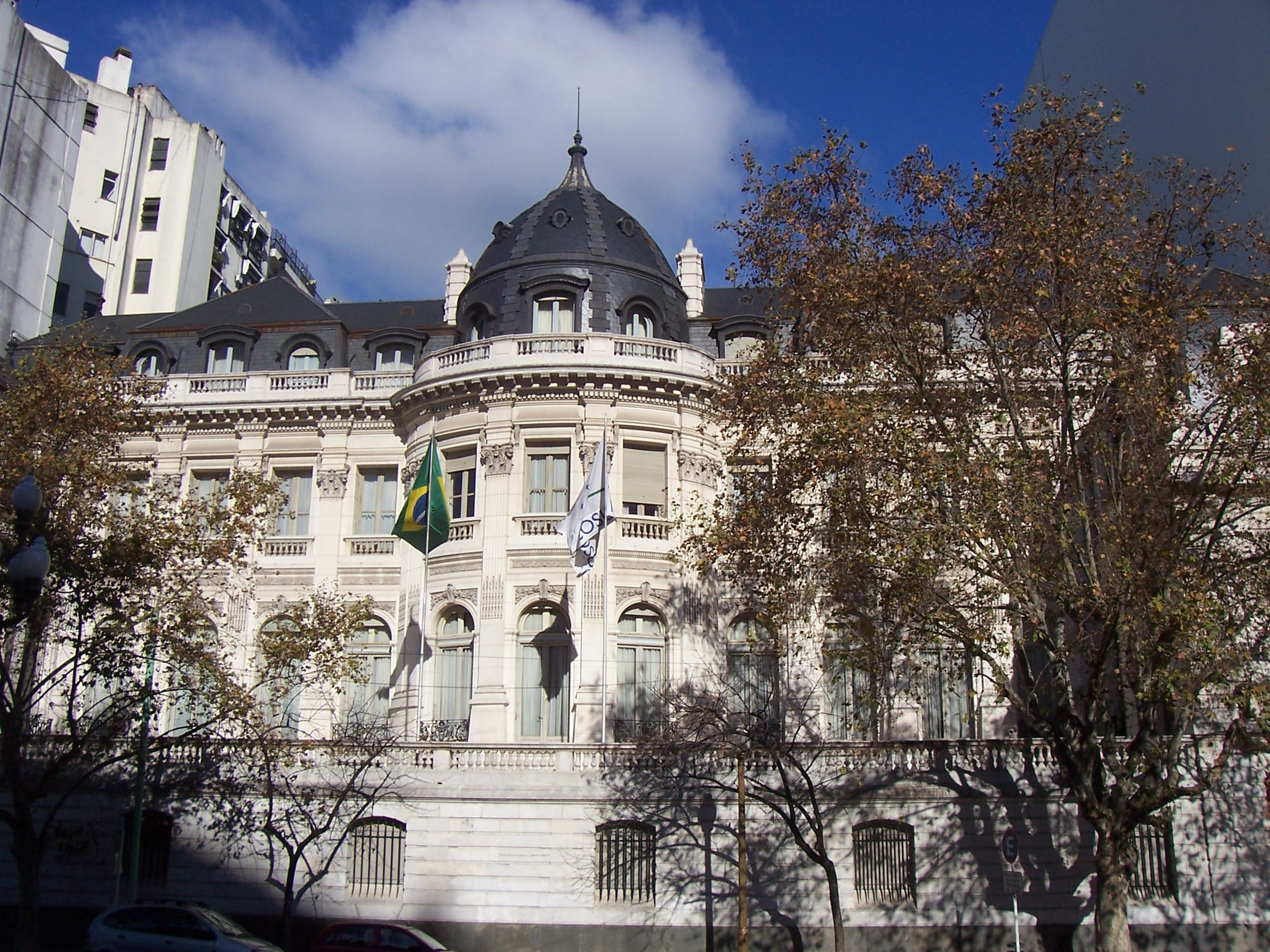 Residencias Alzaga Unzué, Ortiz Basualdo (Embajada de Francia), Atucha, Palacio Pereda y Plazoleta Carlos Pellegrini